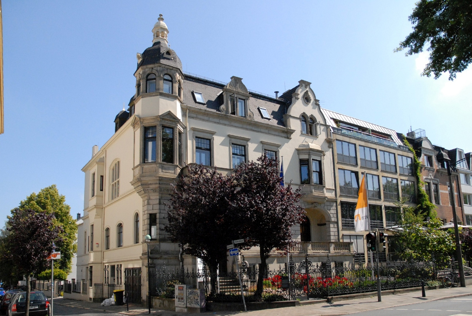 Haus Hirschfeld, Osterdeich 17, 1898-1899 von Gildemeister & Sunkel